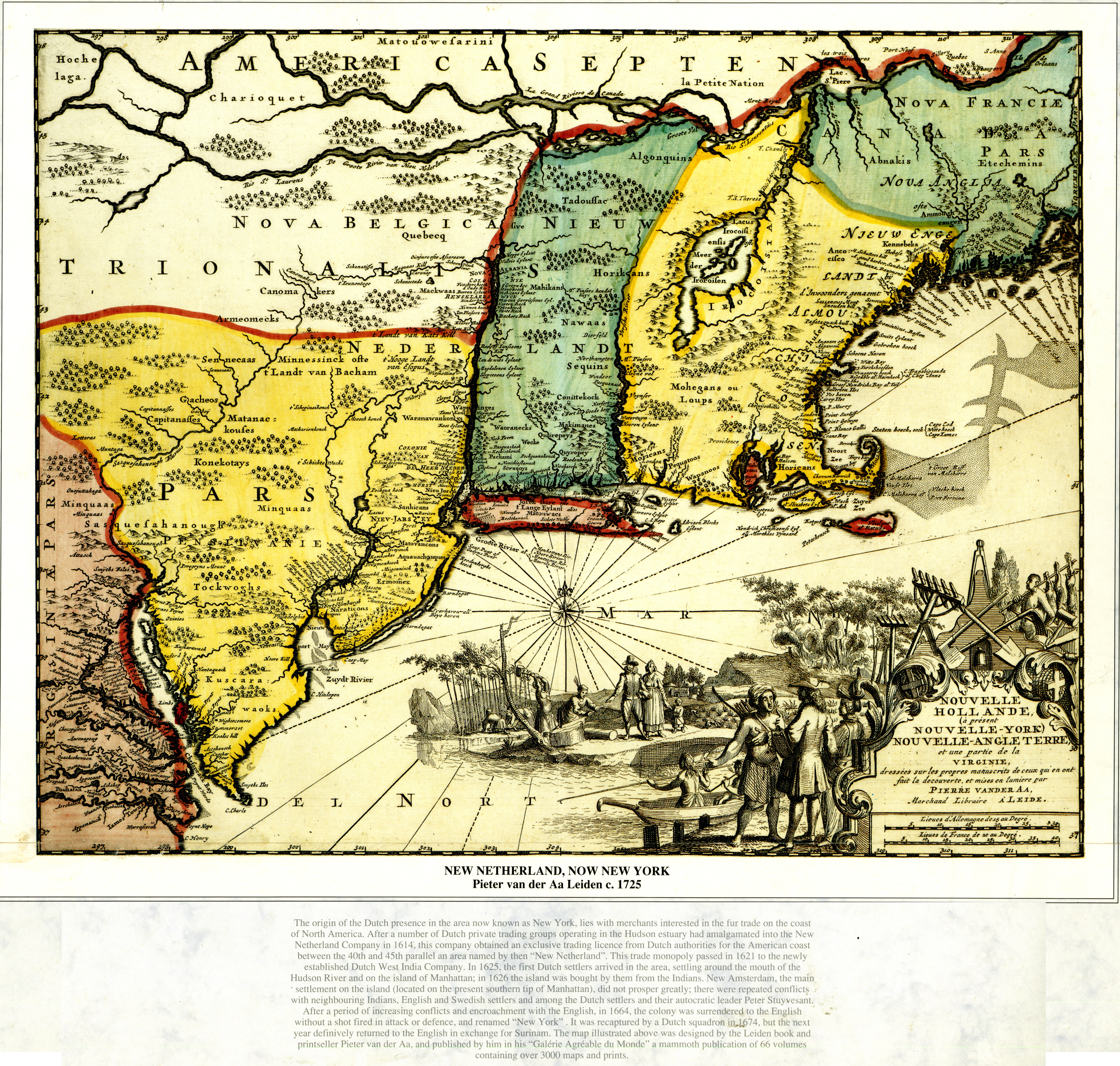 Diapositiva de acceso público consultada del ejemplar original que se custodia en los Fondos Bibliográficos y Cartográfico (Sección: Historia de América del Norte) del Archivo Histórico del Guayas - Guayaquil, Ecuador.Compartido y consultado usuario J. Javier García A.